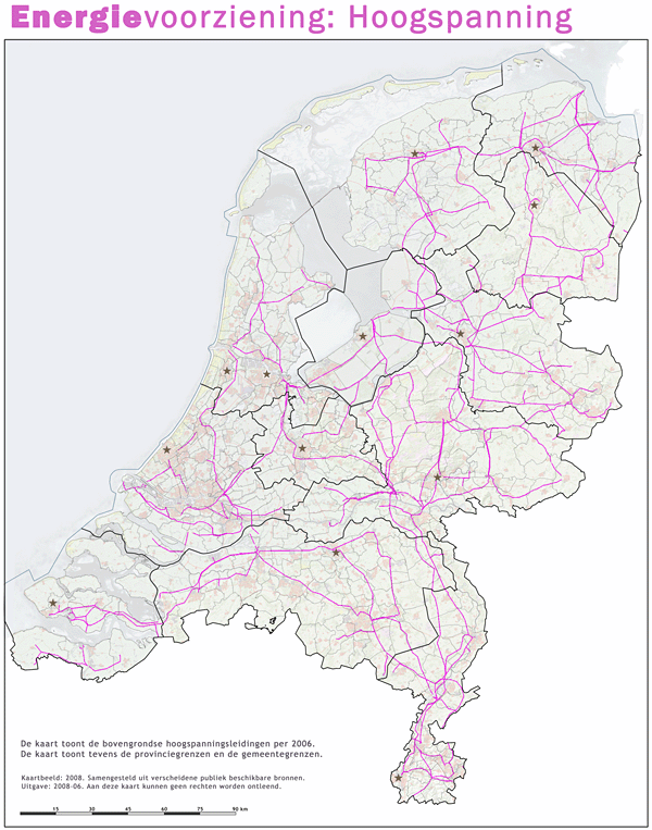 Netwerk van hoogspanningsleidingen in Nederland, situatie 2006.